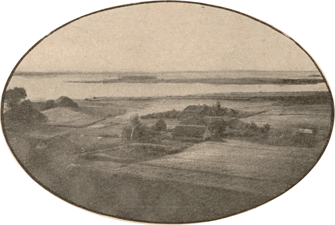 Беларуская (тарашкевіца): Дрысьвяты (Dryśviaty). Выспа Замак з званіцы касьцёла